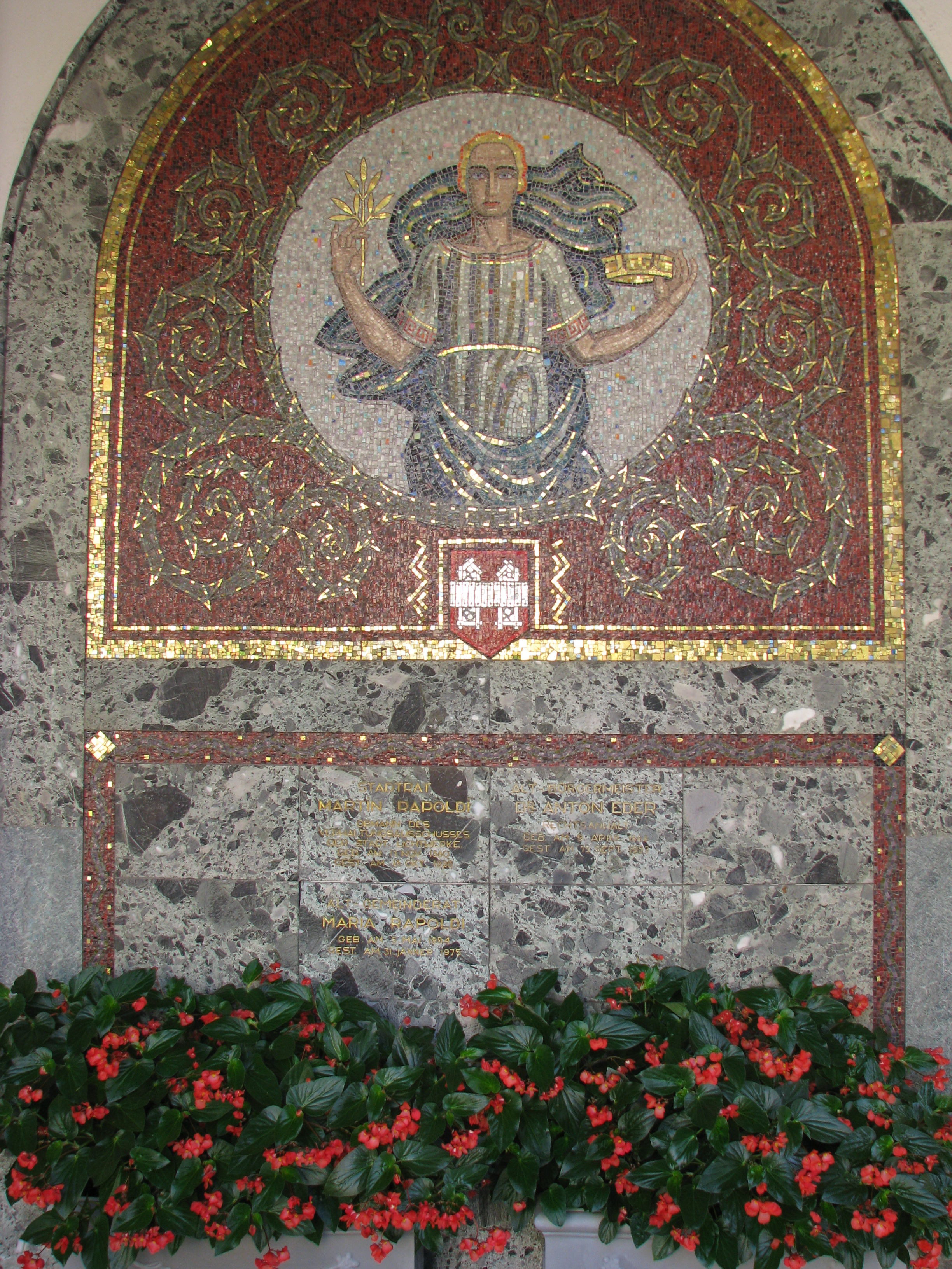 Westfriedhof Innsbruck, Nördlicher Teil, Ostarkaden: Ehrengrab der Stadt Innsbruck für Martin Rapoldi und Anton Eder